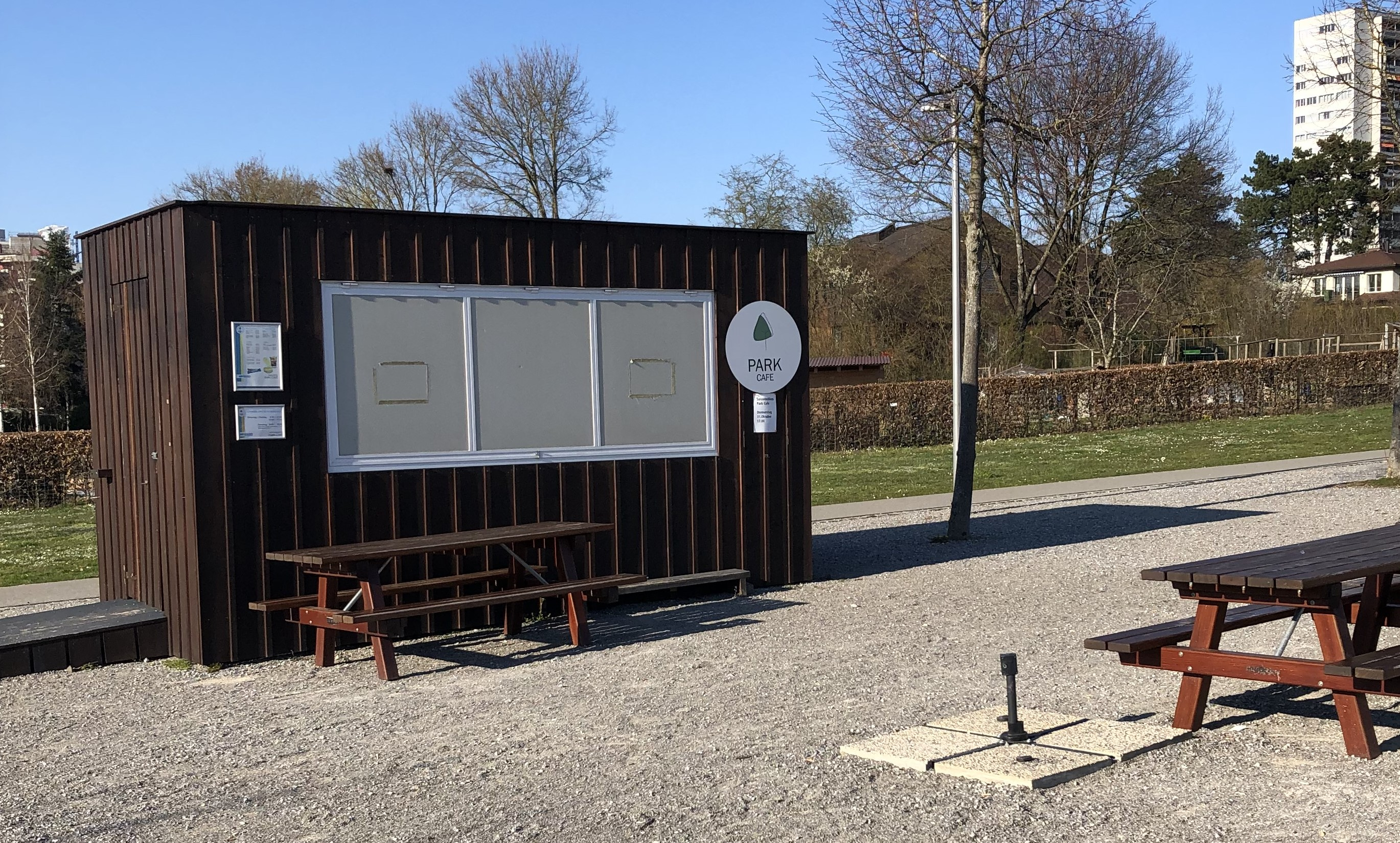 Parkcafé Brünnengut